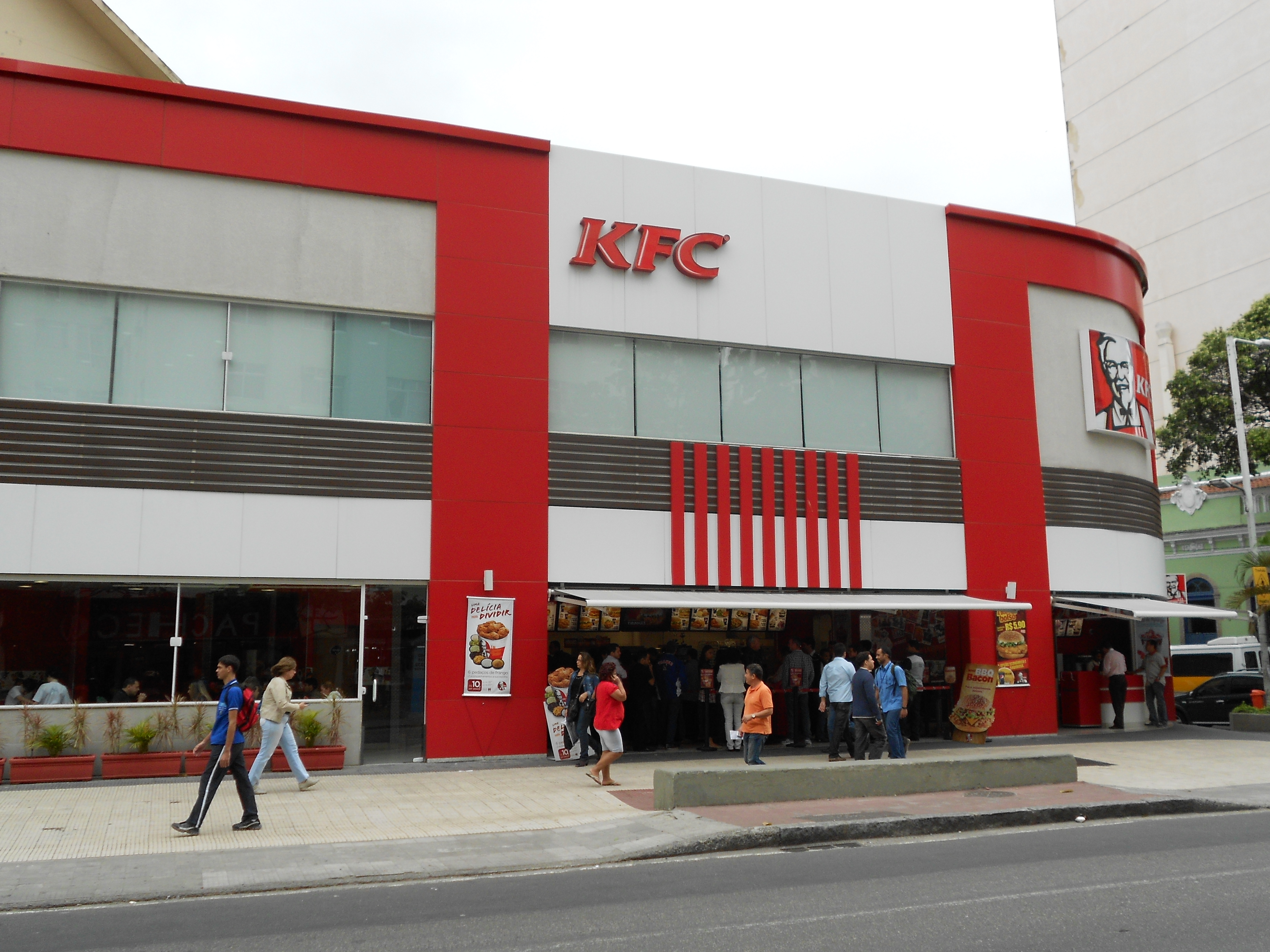 KFC, na Rua Voluntários da Pátria, Botafogo, Rio de Janeiro, Brasil.